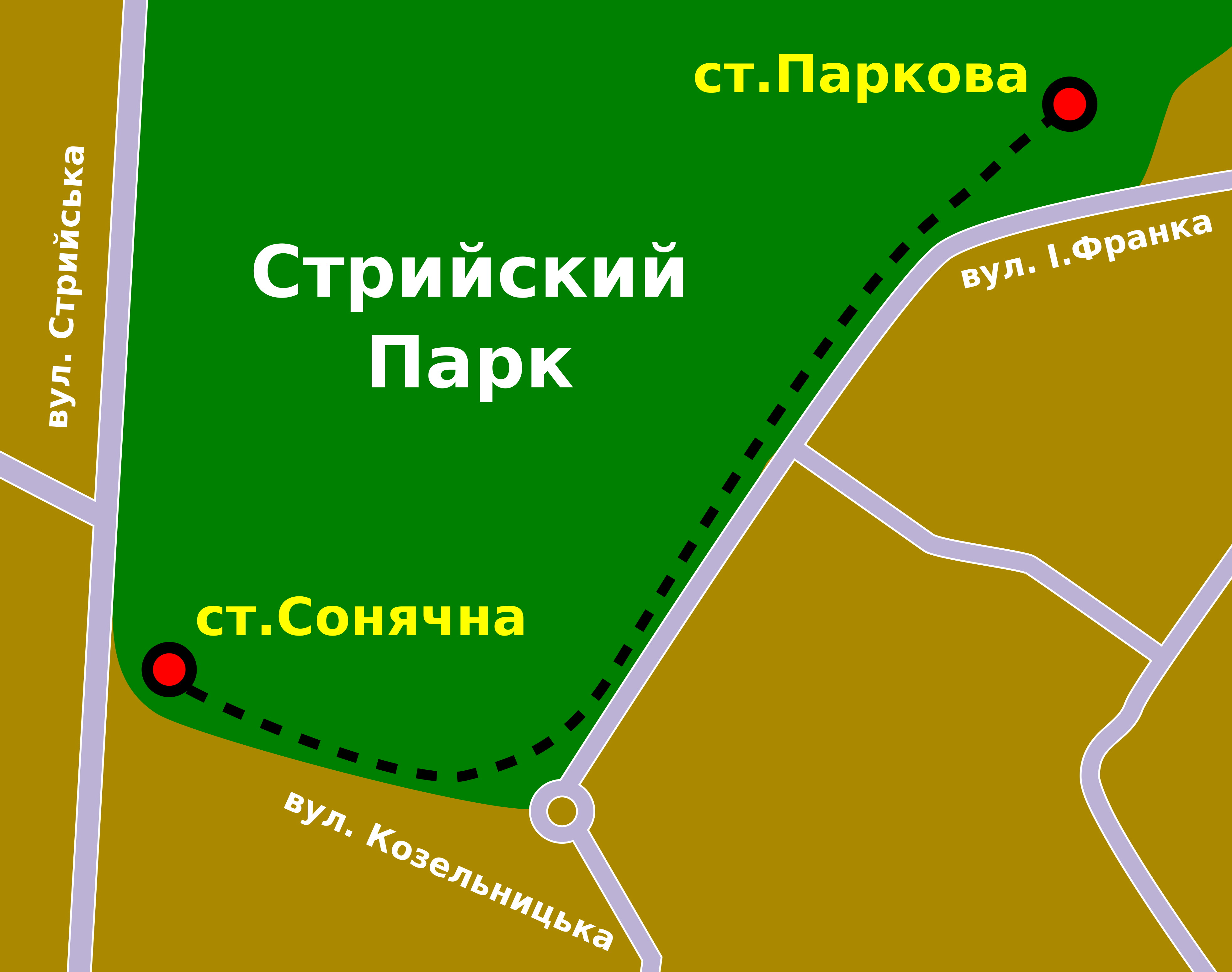 Розташування станцій львівської дитячої залізниці саном на 2019 рік.